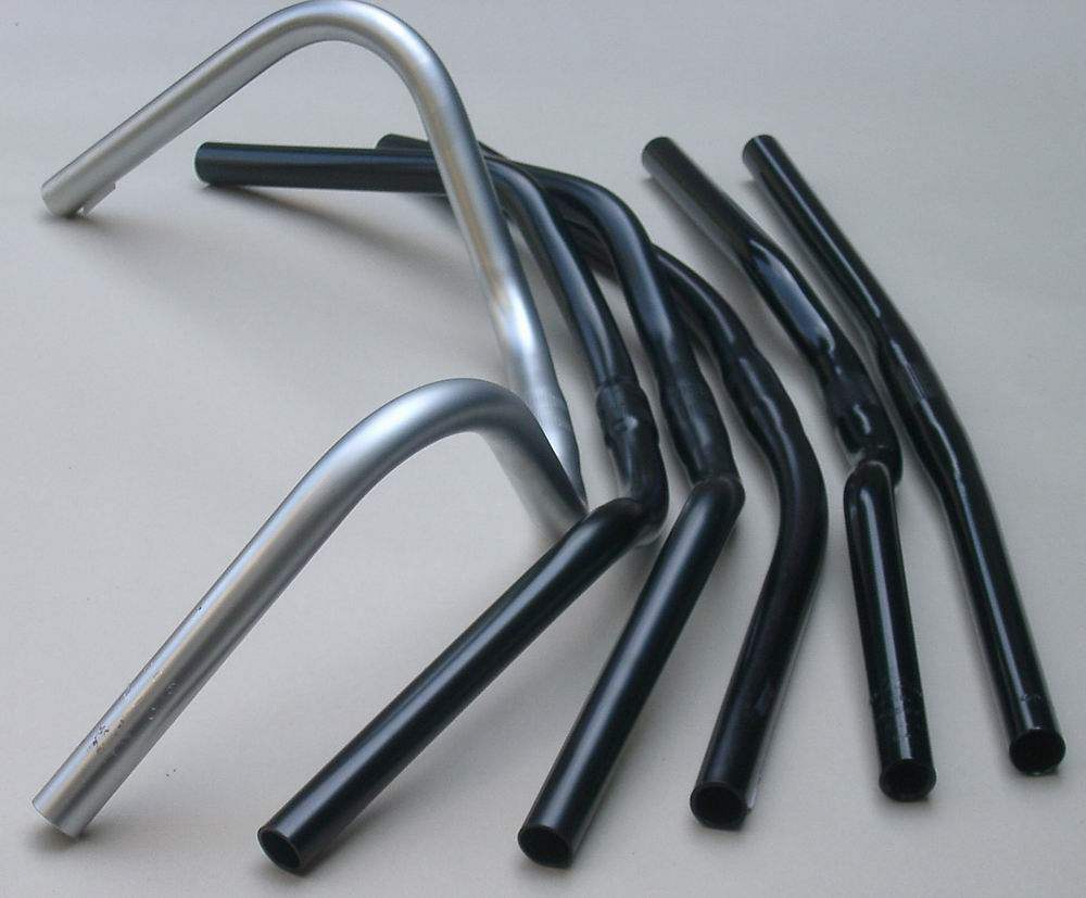 Lenkerbügel-Sortiment von sportlicher bis komfortabler Sitzhaltung